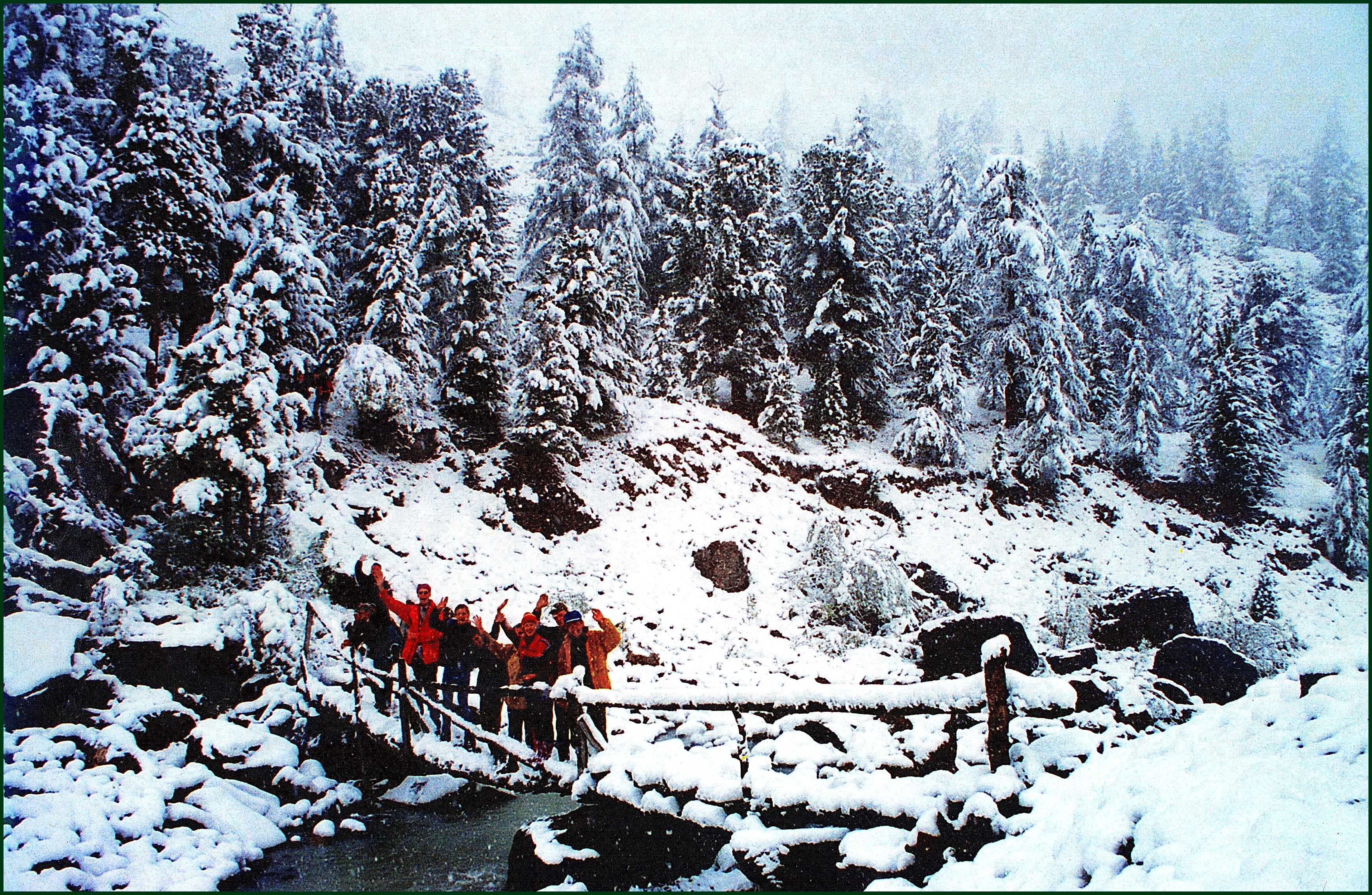 Горноледниковый бассейн Актру, в котором по инициативе профессора М. В. Тронова более полувека проводятся гляциологические стационарные работы. Научные «внуки и правнуки» М. В. Тронова в экспедиции, июль, Актру, 1996 г. Фото А. Н. Рудого. Собственное фото. Не публиковалось.